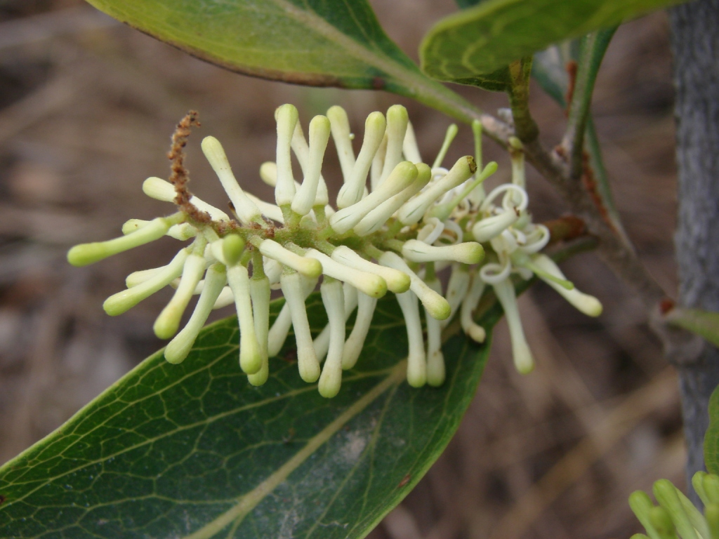 Roupala montana Aubl. - PROTEACEAE - Parque Estadual do Biribiri - Serra do Espinhaço - Diamantina - Minas Gerais - Brasil.